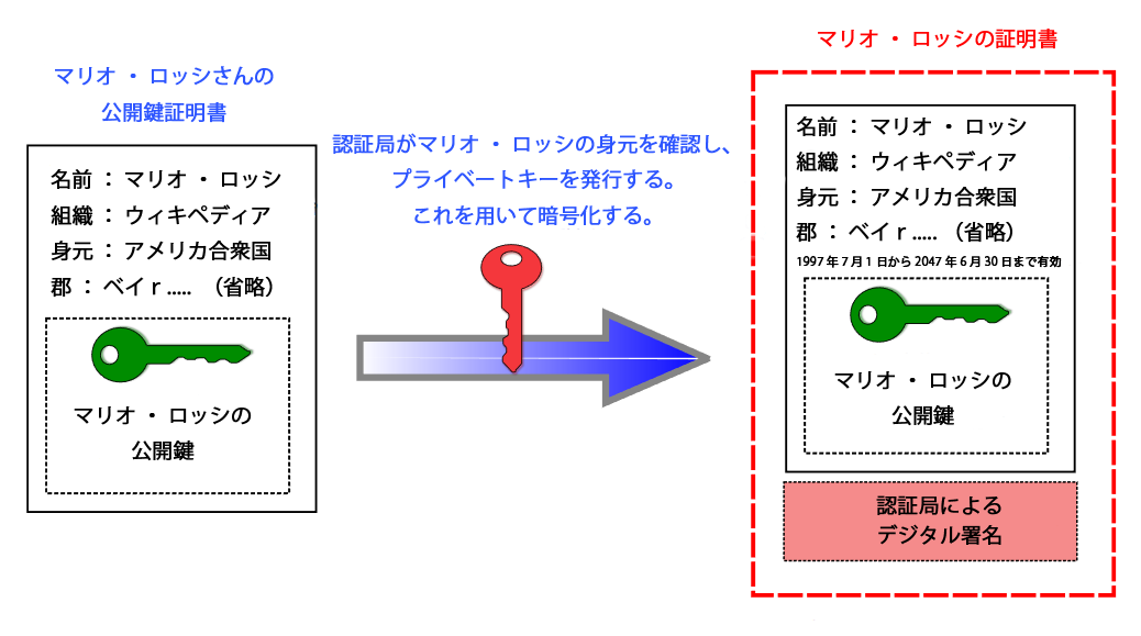 Giarosによって作成されたの公開鍵証明書図（イタリア語版）を日本語に翻訳。